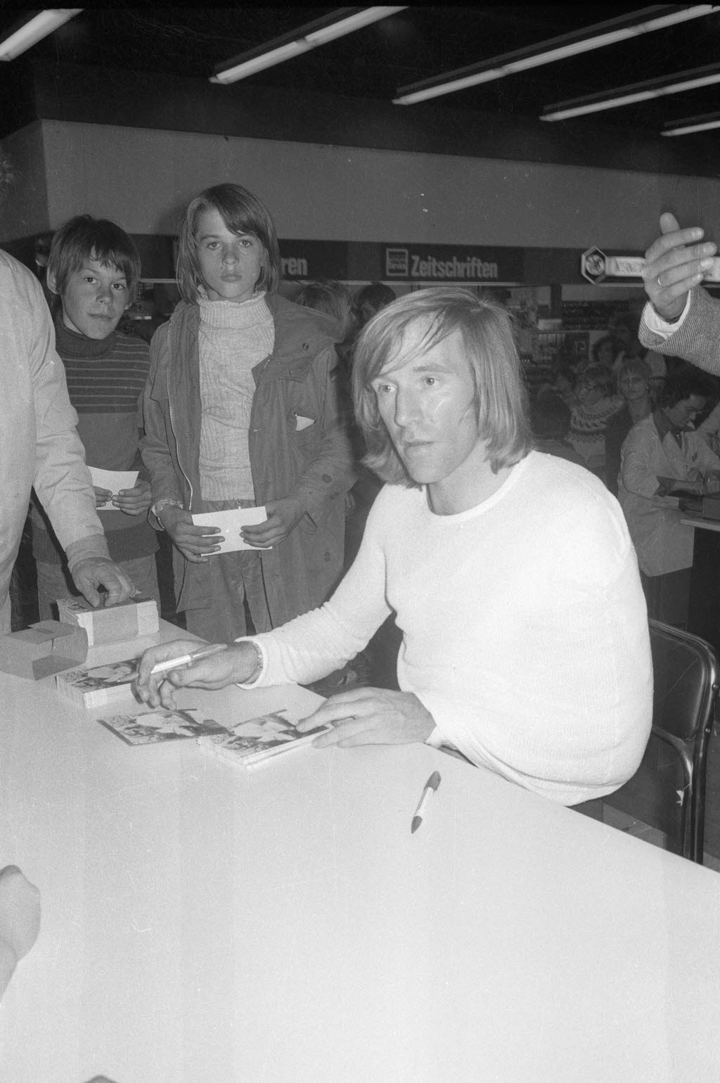 im Plaza-Einkaufszentrum im Winterbeker Weg 44.